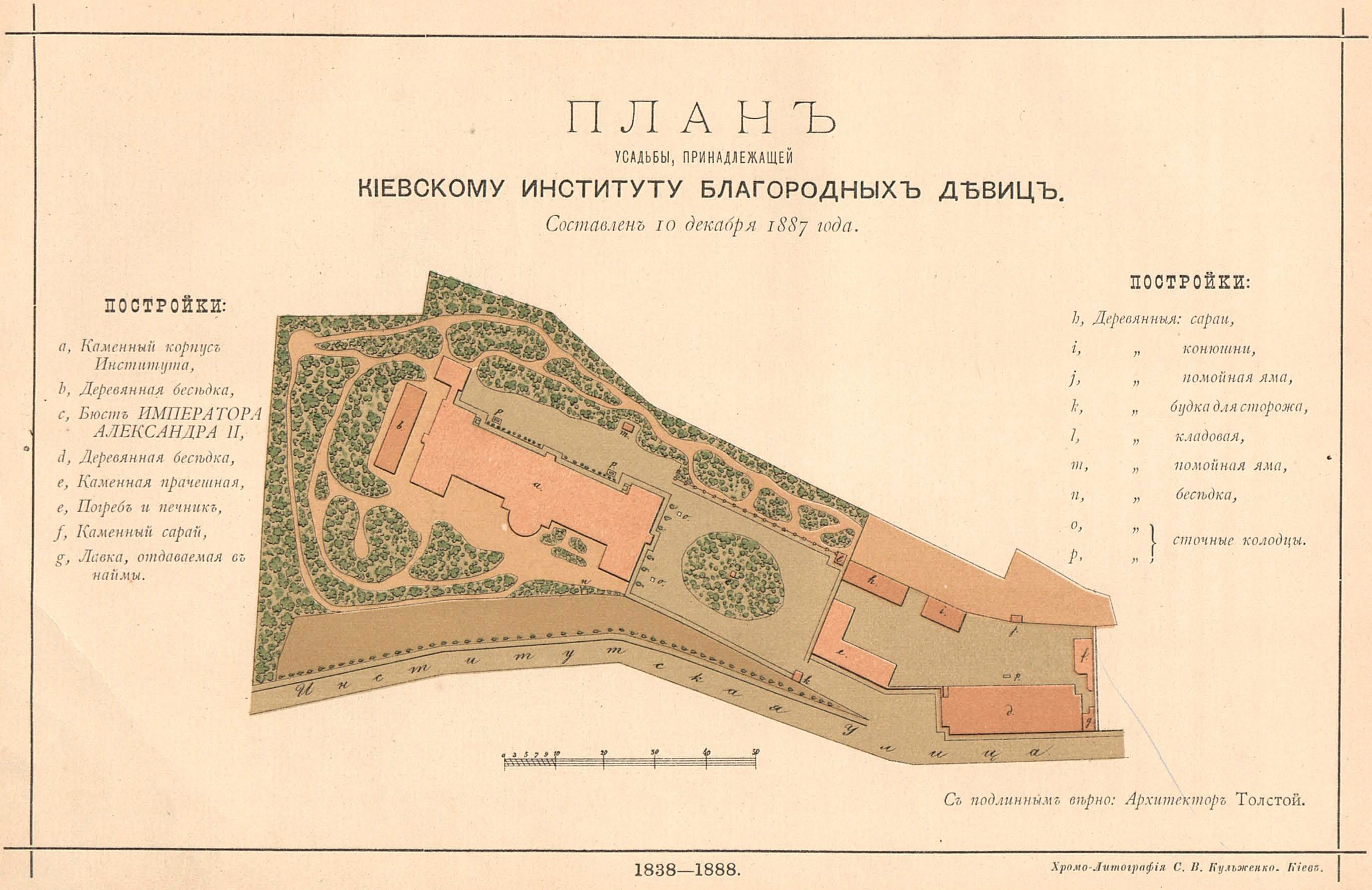 план Киевский институт благородных девиц